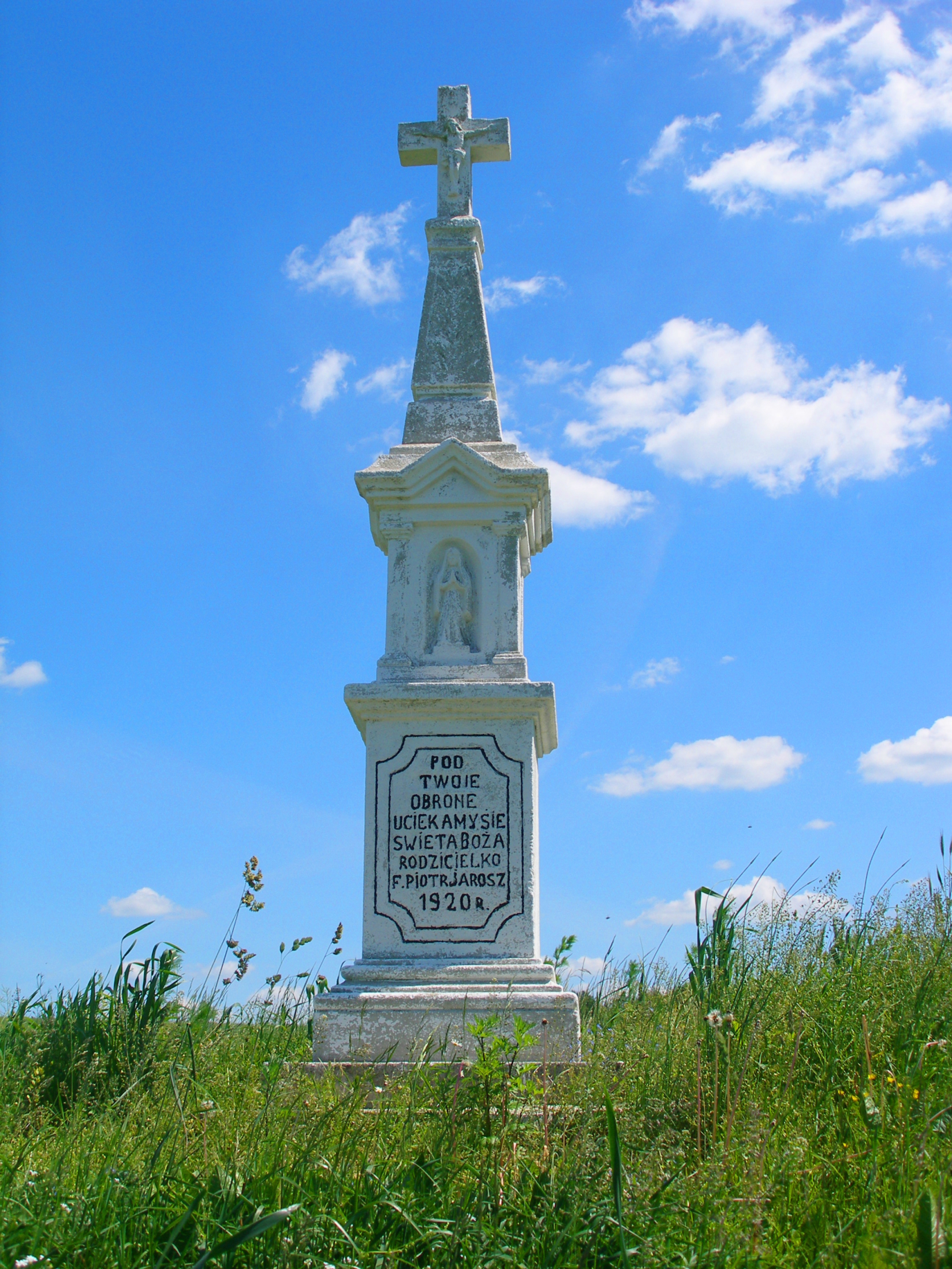 Kapliczka z 1920r. k. Skierbieszowa